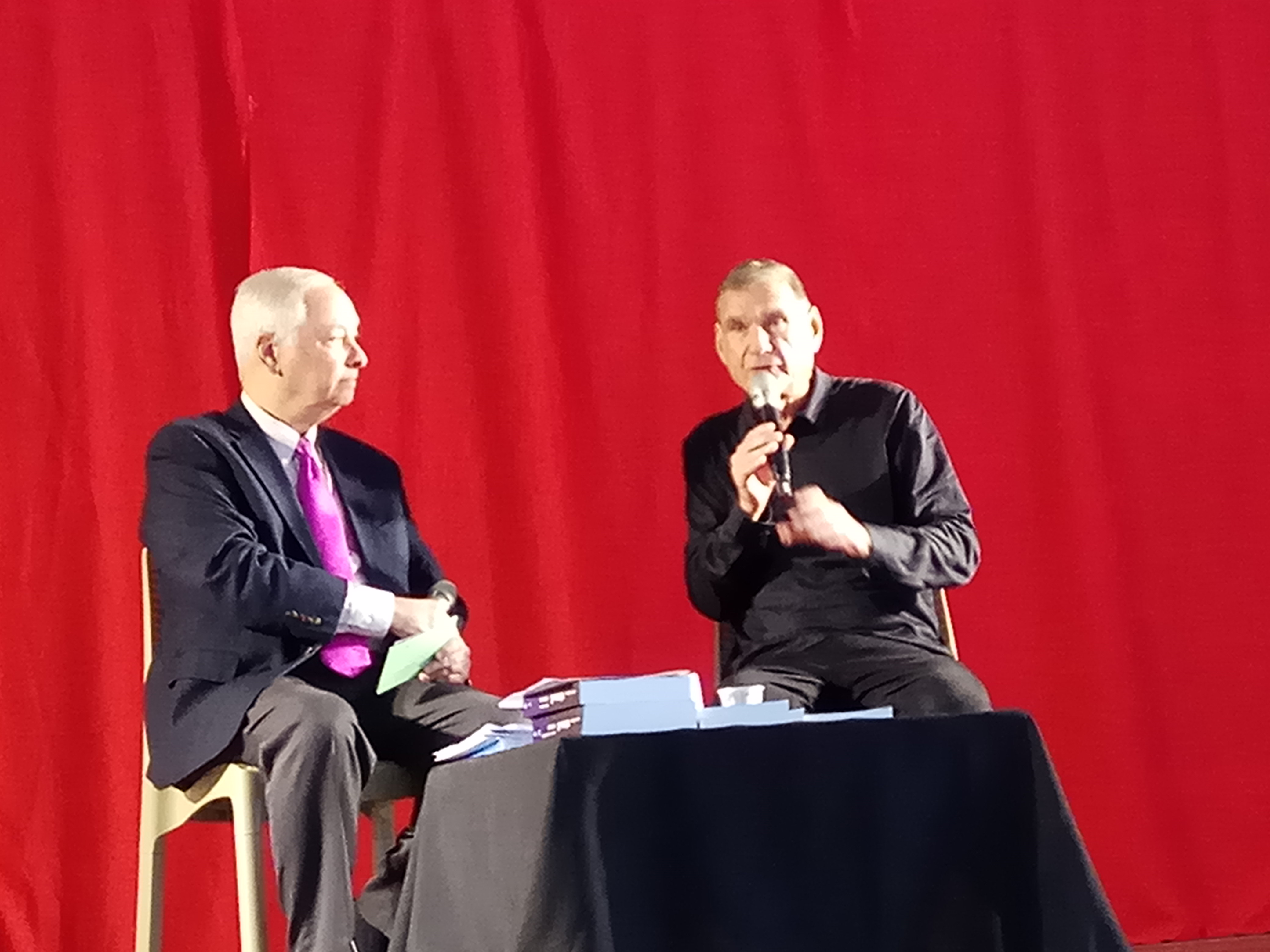 חיים רמון באירוע שבתרבות בנווה מונוסון עם אבי בטלהיים